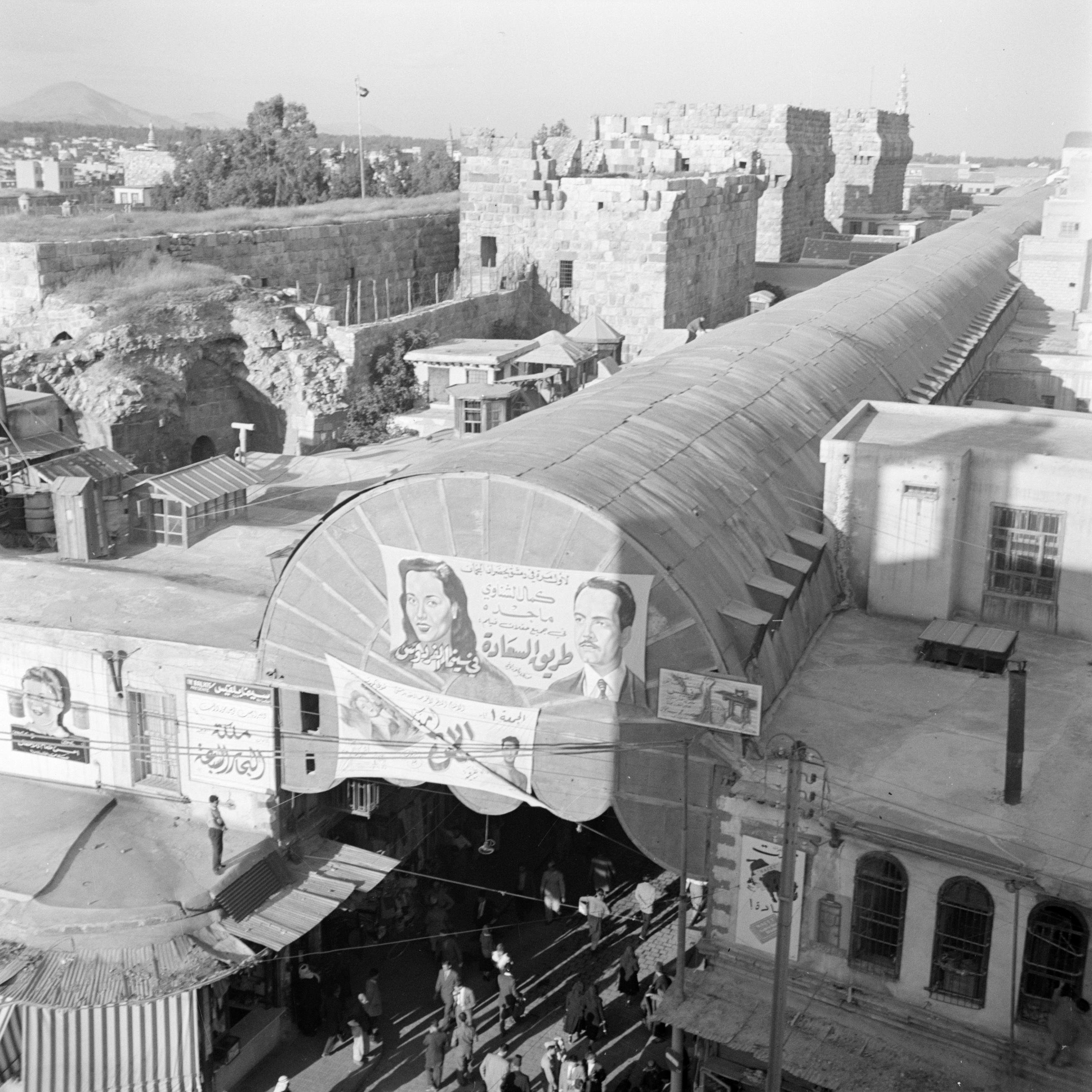 Collectie / Archief : Fotocollectie Van de Poll Reportage / Serie : Midden-Oosten 1950-1955: Syrië - Damascus Beschrijving : Entree van de citadel en van de suq Hamidieh Datum : 1950 Locatie : Damascus, Syrië Trefwoorden : fortificaties, gebouwen, markten, stadsbeelden Fotograaf : Poll, Willem van de Auteursrechthebbende : Nationaal Archief Materiaalsoort : Negatief (zwart/wit) Nummer archiefinventaris : bekijk toegang 2.24.14.02 Bestanddeelnummer : 255-5855